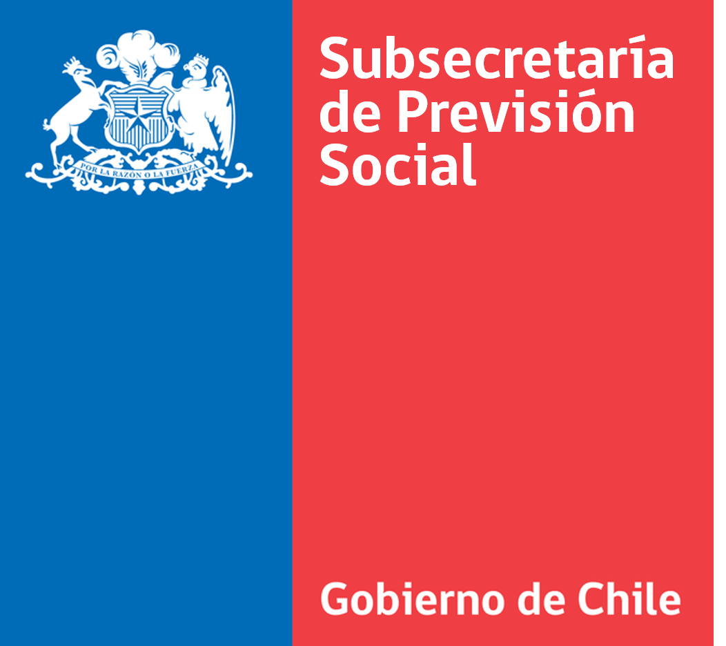 Logo Institucional de la Subsecretaría de Previsión Social.